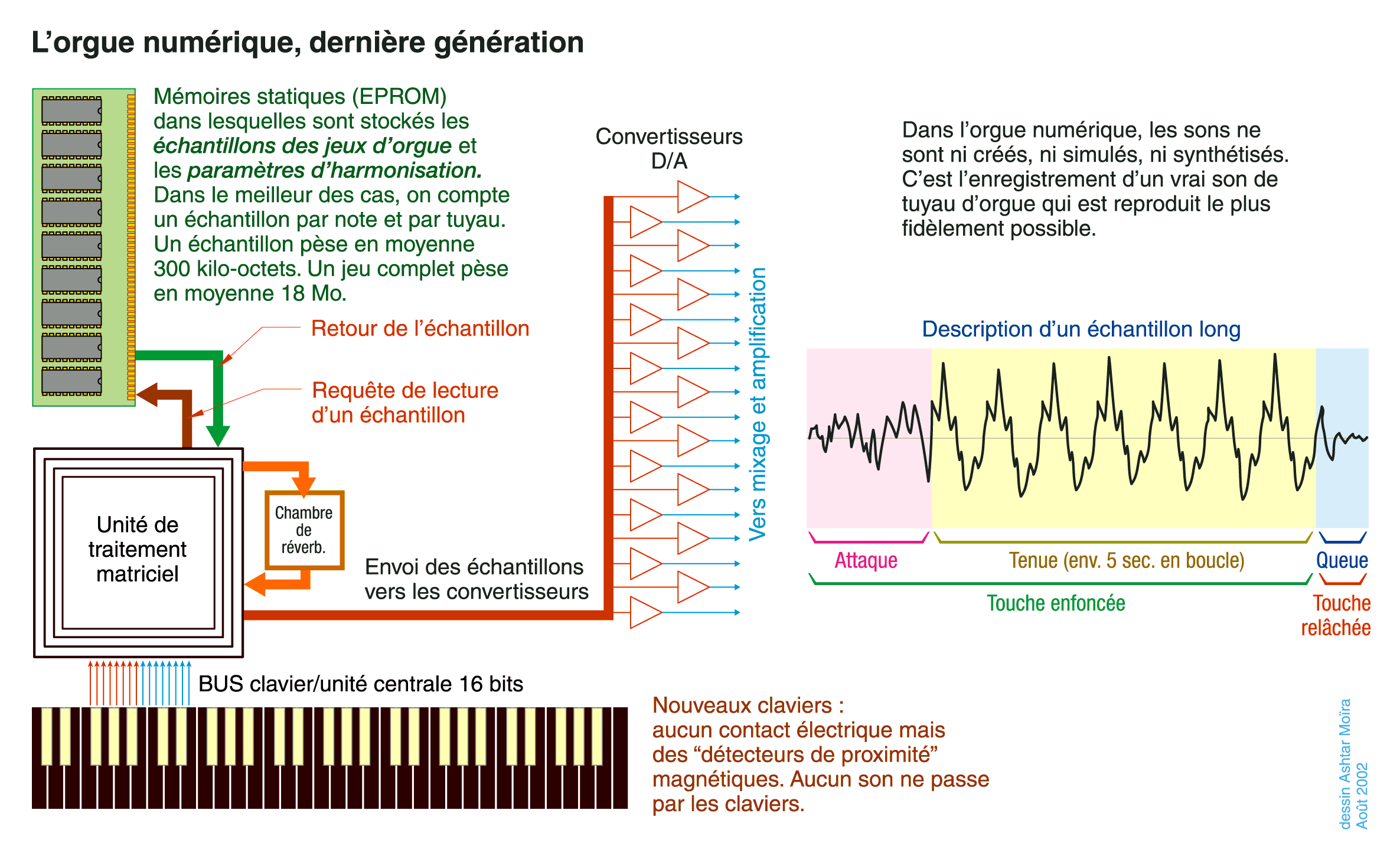 Schéma montrant le principe de fonctionnement de l'orgue numérique